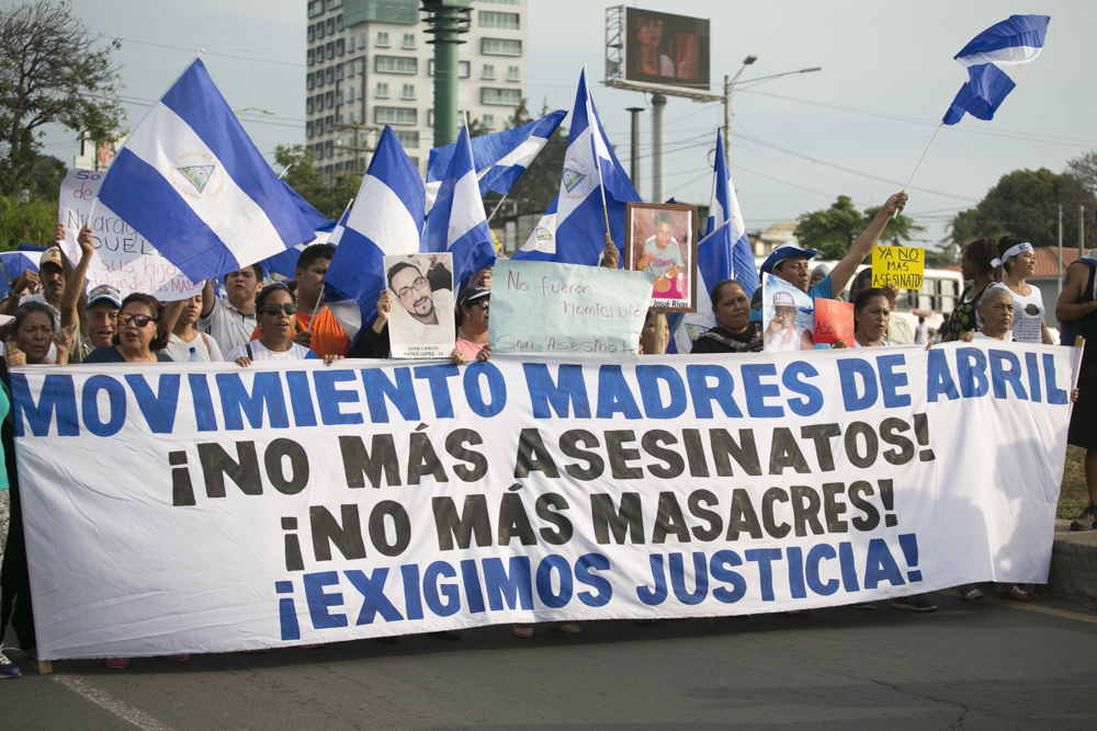 Madres de Abril de Nicaragua